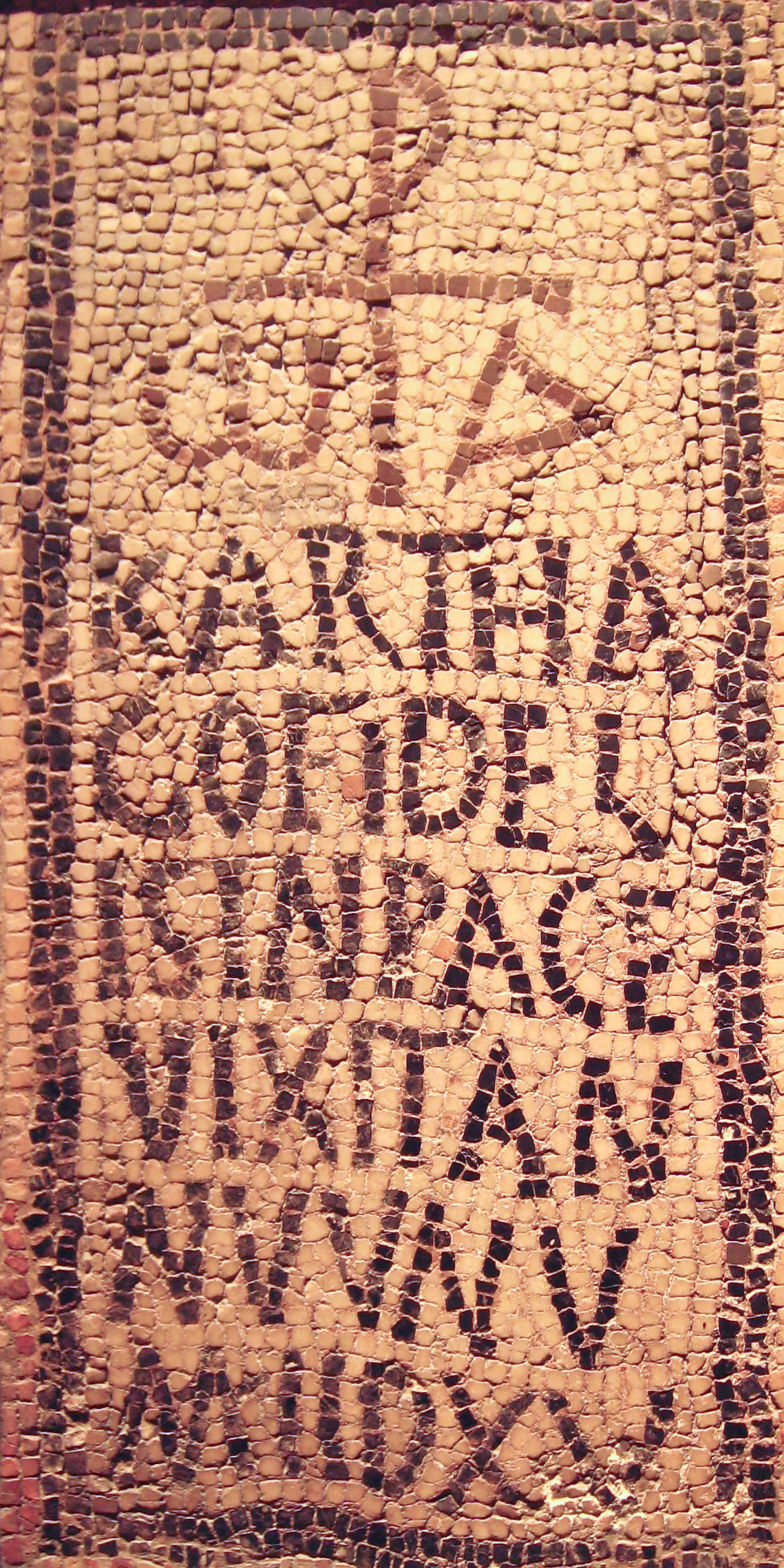 4th-5th c. AD